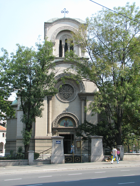 Crkva Aleksandra Nevskog